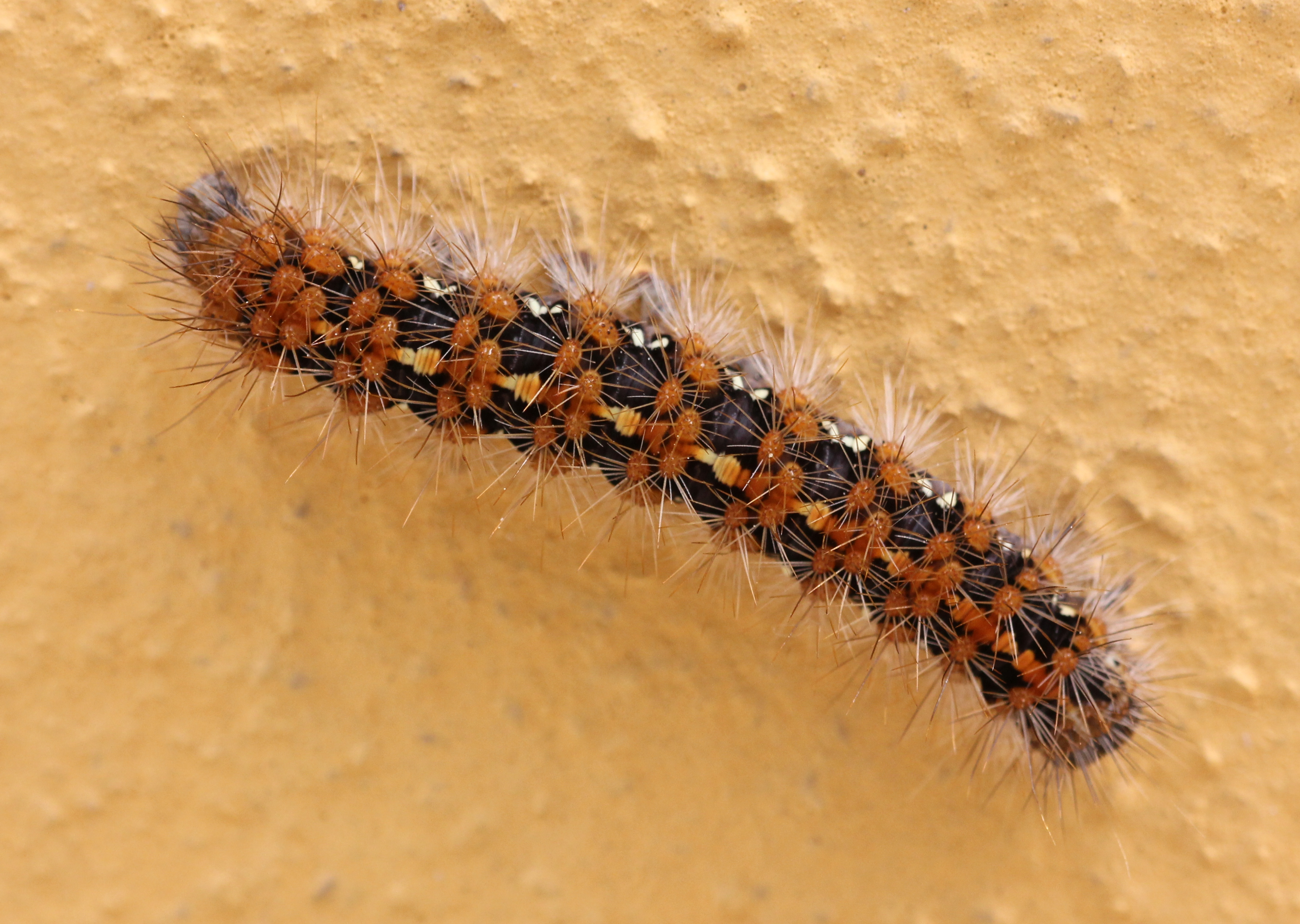 Raupe des Russischen Bären (Euplagia quadripunctaria) an einer Hauswand in Porto Ronco im Tessin